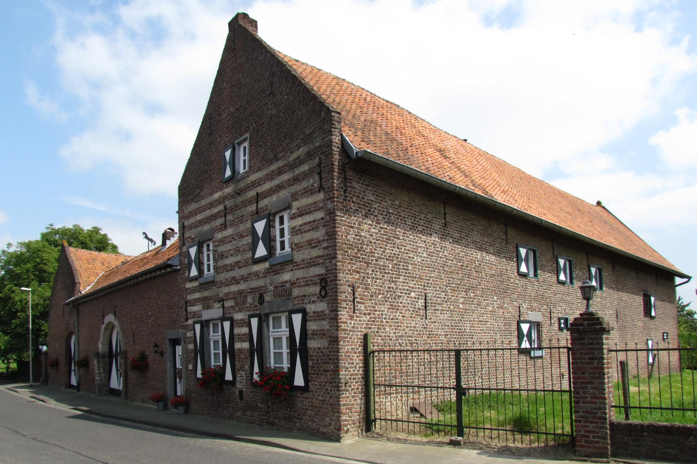 Hillensberg Historische Hofanlage